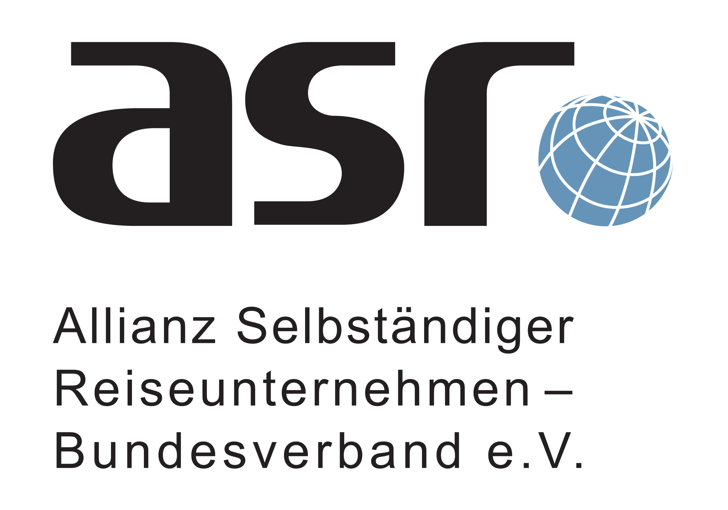 Logo Allianz selbständiger Reiseunternehmen - Bundesverband e.V.